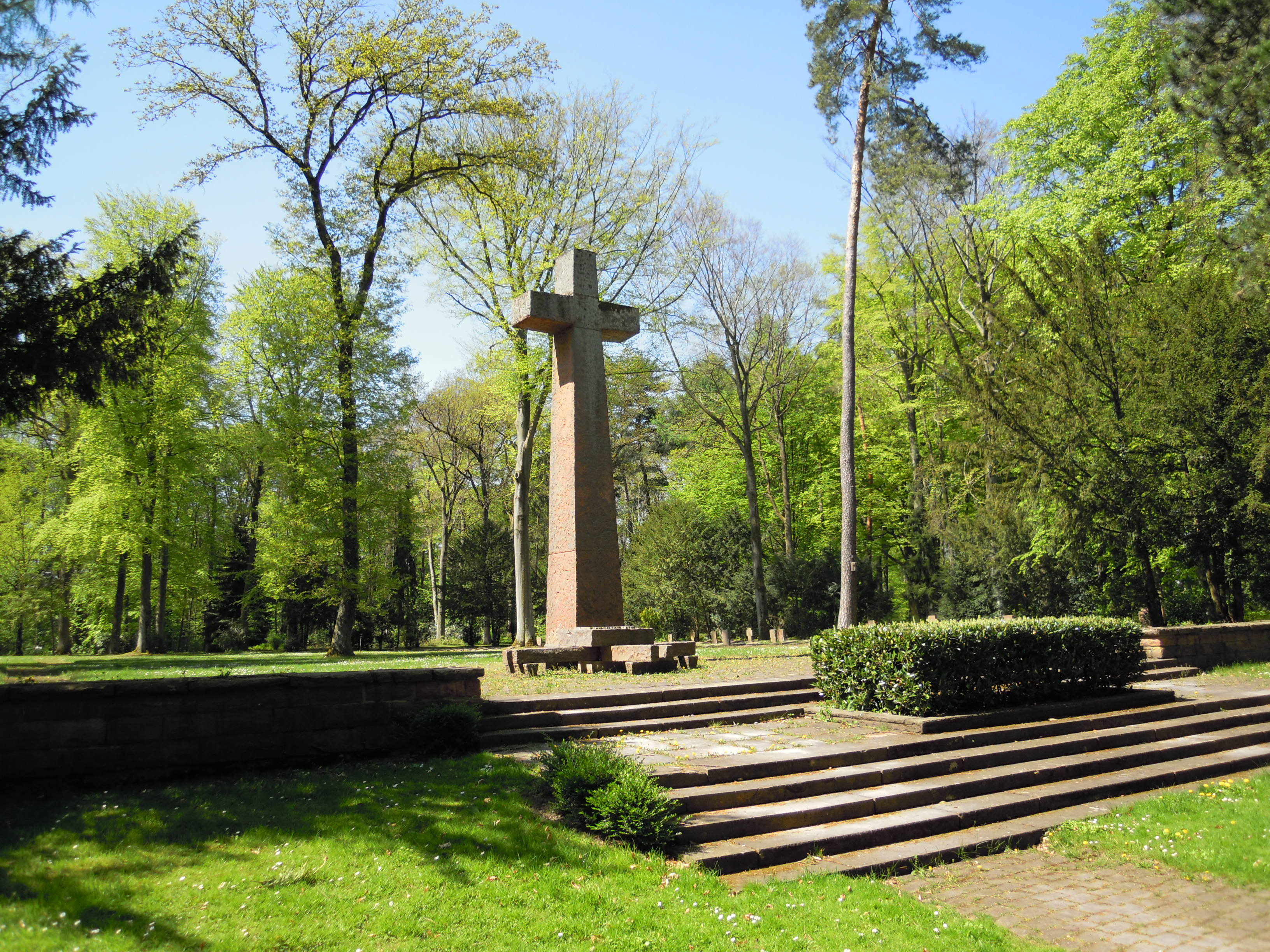 Waldfriedhof in Frankfurt-Oberrad, Burgenlandweg, Soldatenfriedhof, Denkmal